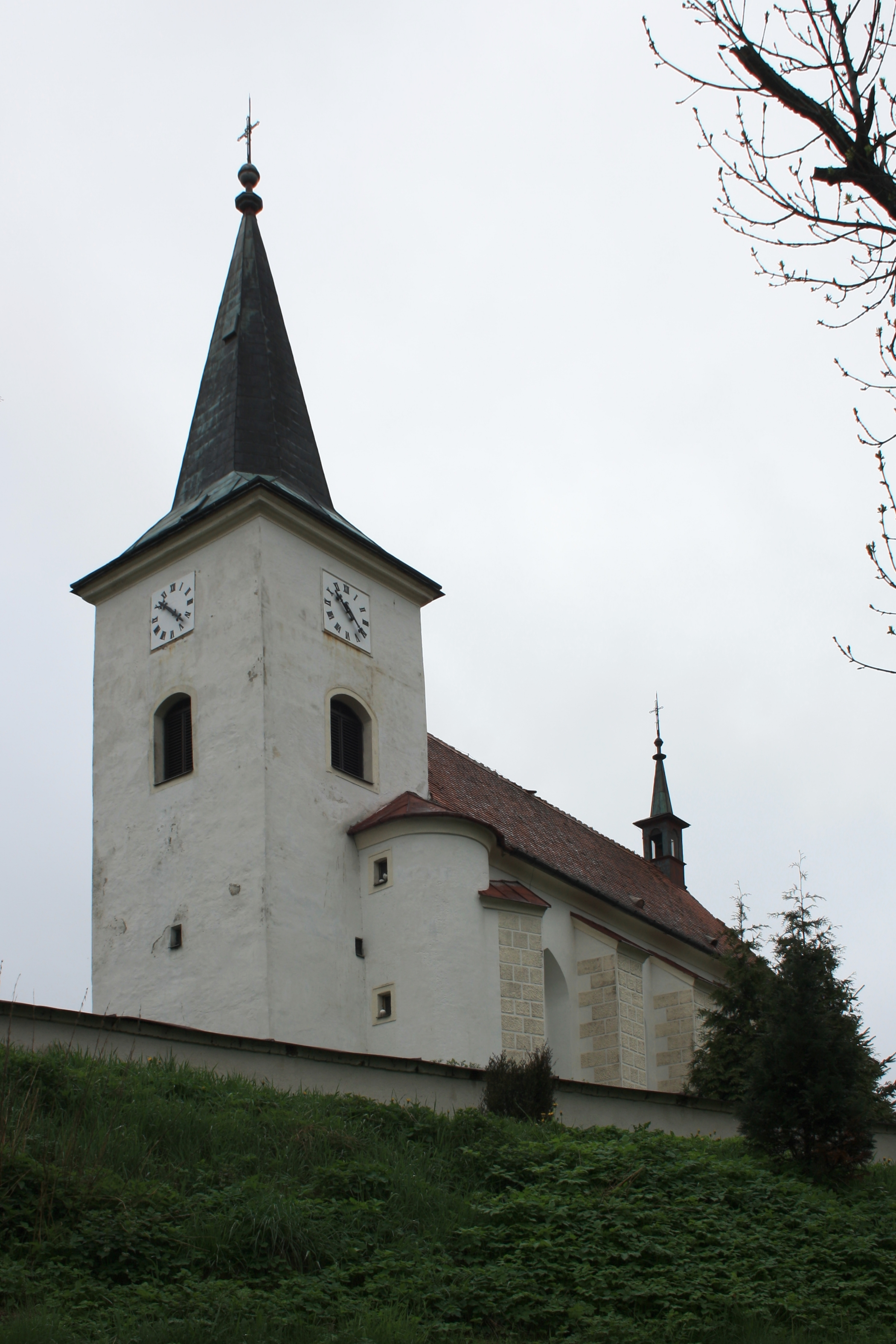 Strážek - kostel svatého Šimona a Judy This photograph was taken within the scope of the 'Czech Municipalities Photographs' grant. This photograph was taken with a DSLR from WMCZ's Camera grant.